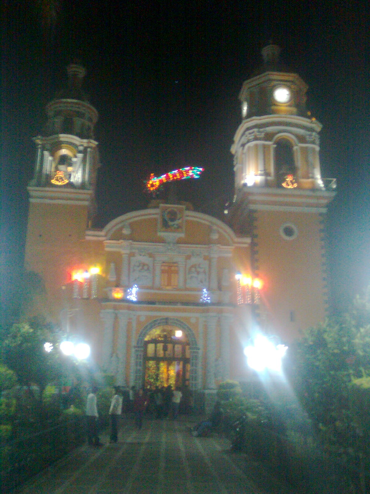 Fotografía de la iglesia de Cuautlancingo la noche del 25 de Diciembre.